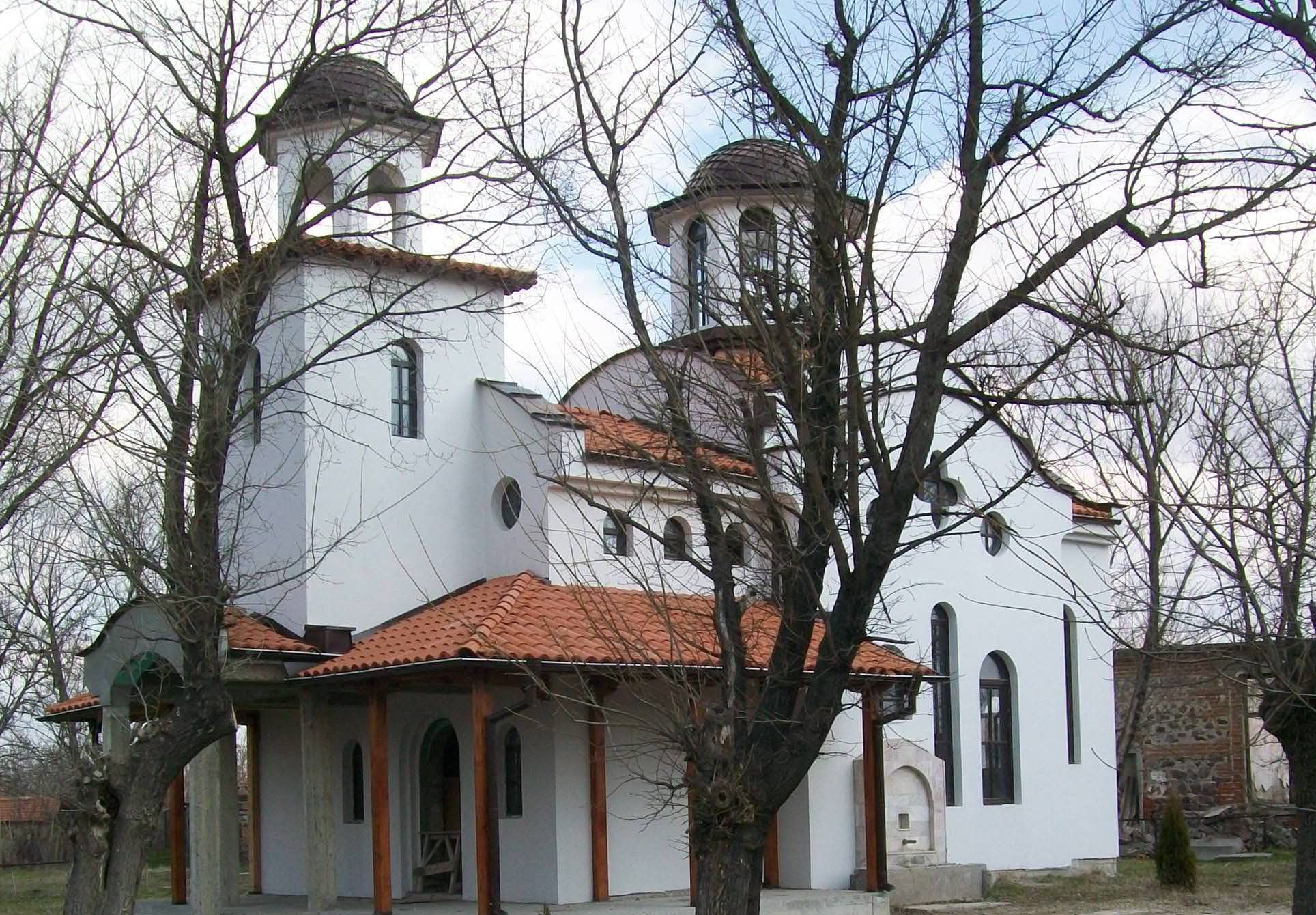 Църква "Свети Пророк Илия" село Дражево